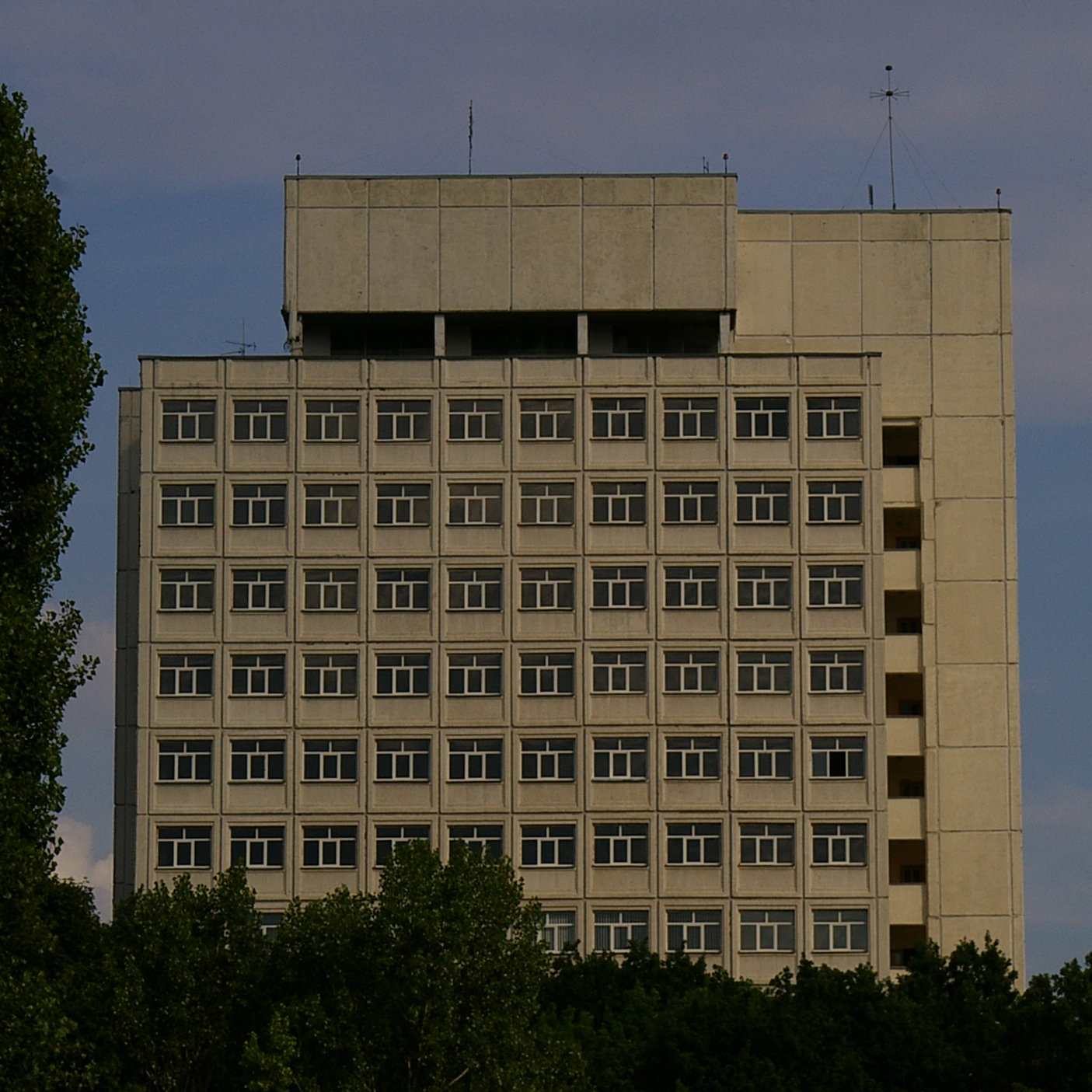 Харьков. Бывший корпус военного училища ХВВКИУ РВ, после краха ракетных войск передан в начале 2000-х НЮА им. Ярослава Мудрого.